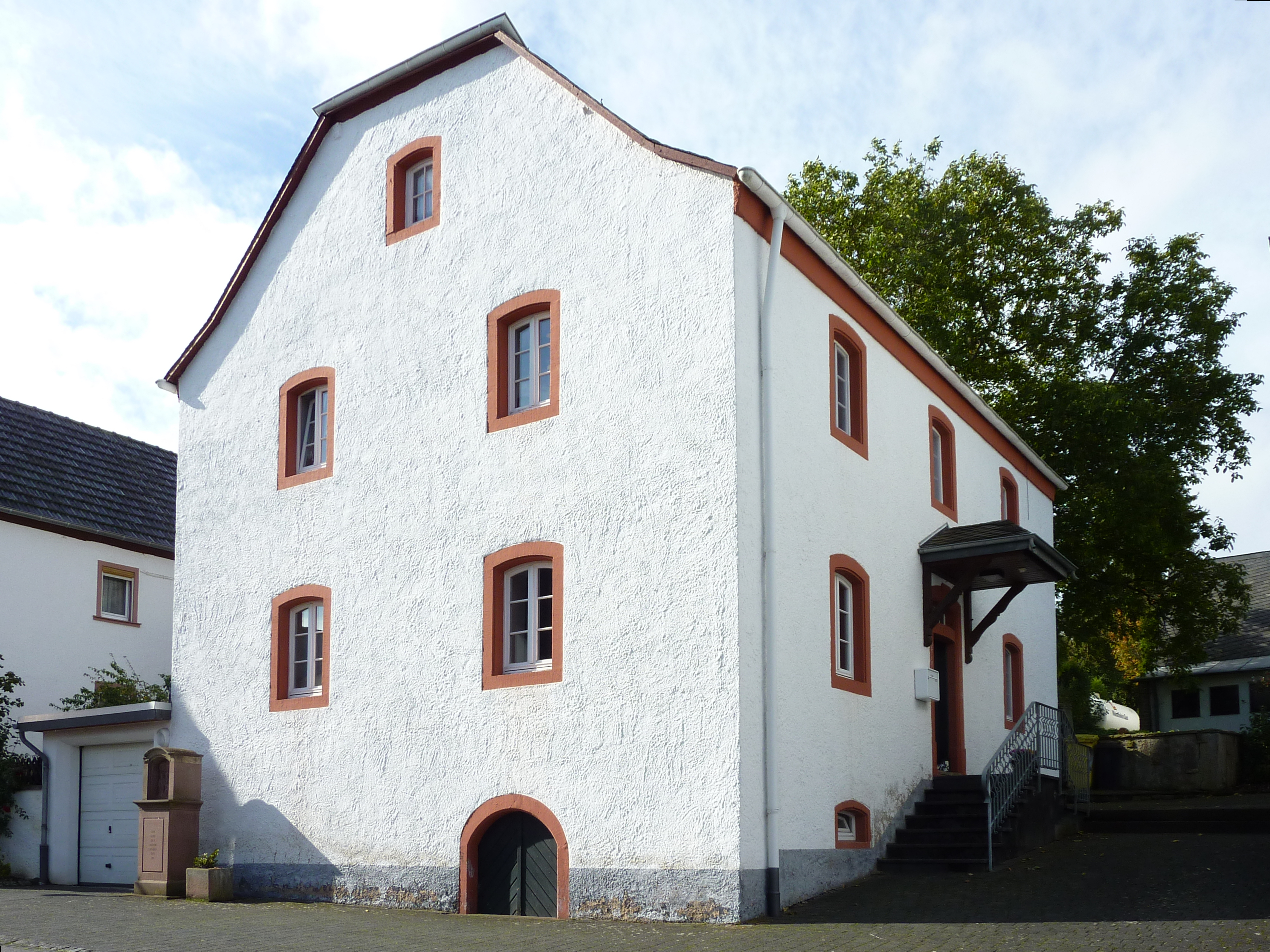 Uedelhoven, Kreuzstr. 28, ehem. Pfarrhaus 1